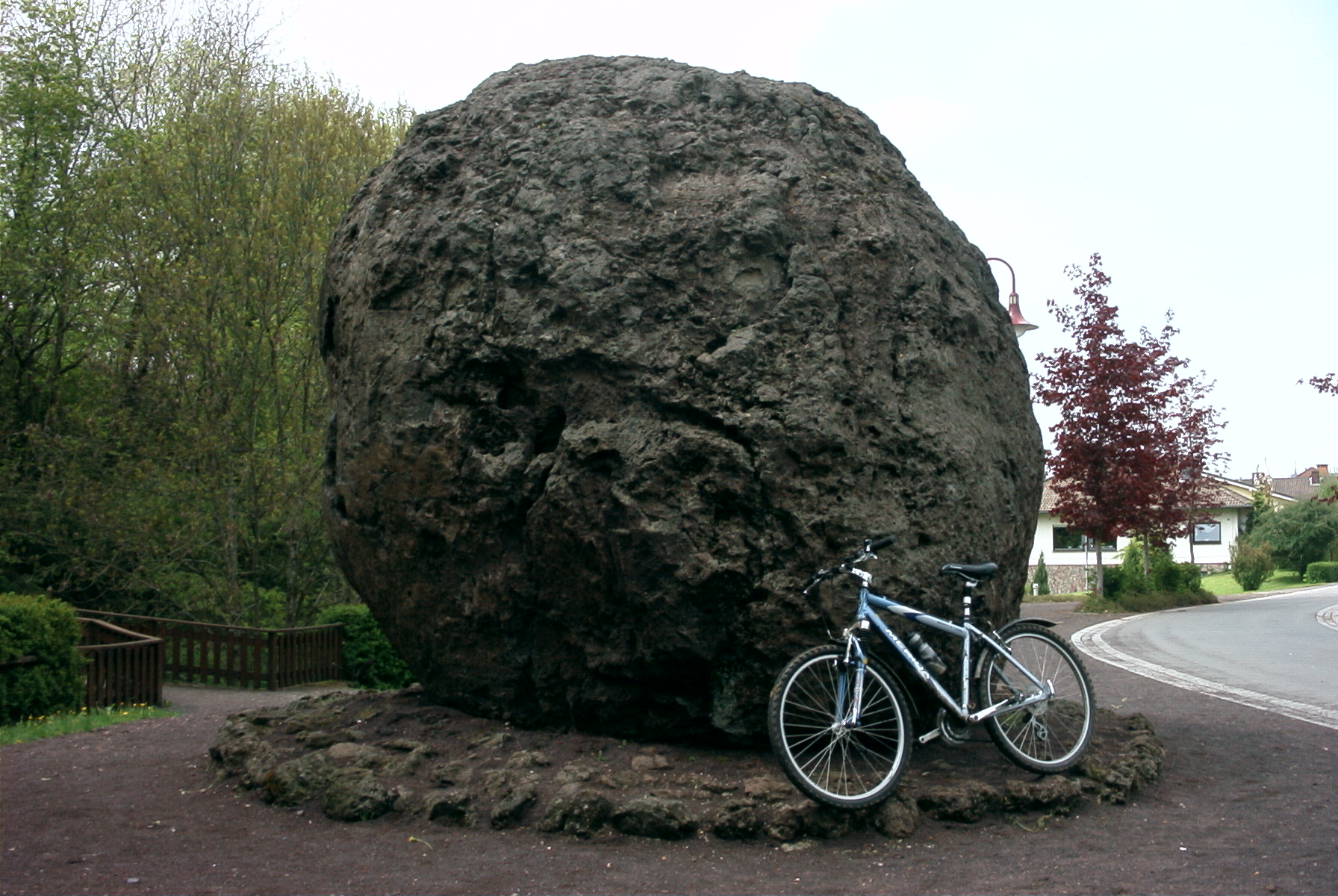 Lavabombe von Strohn